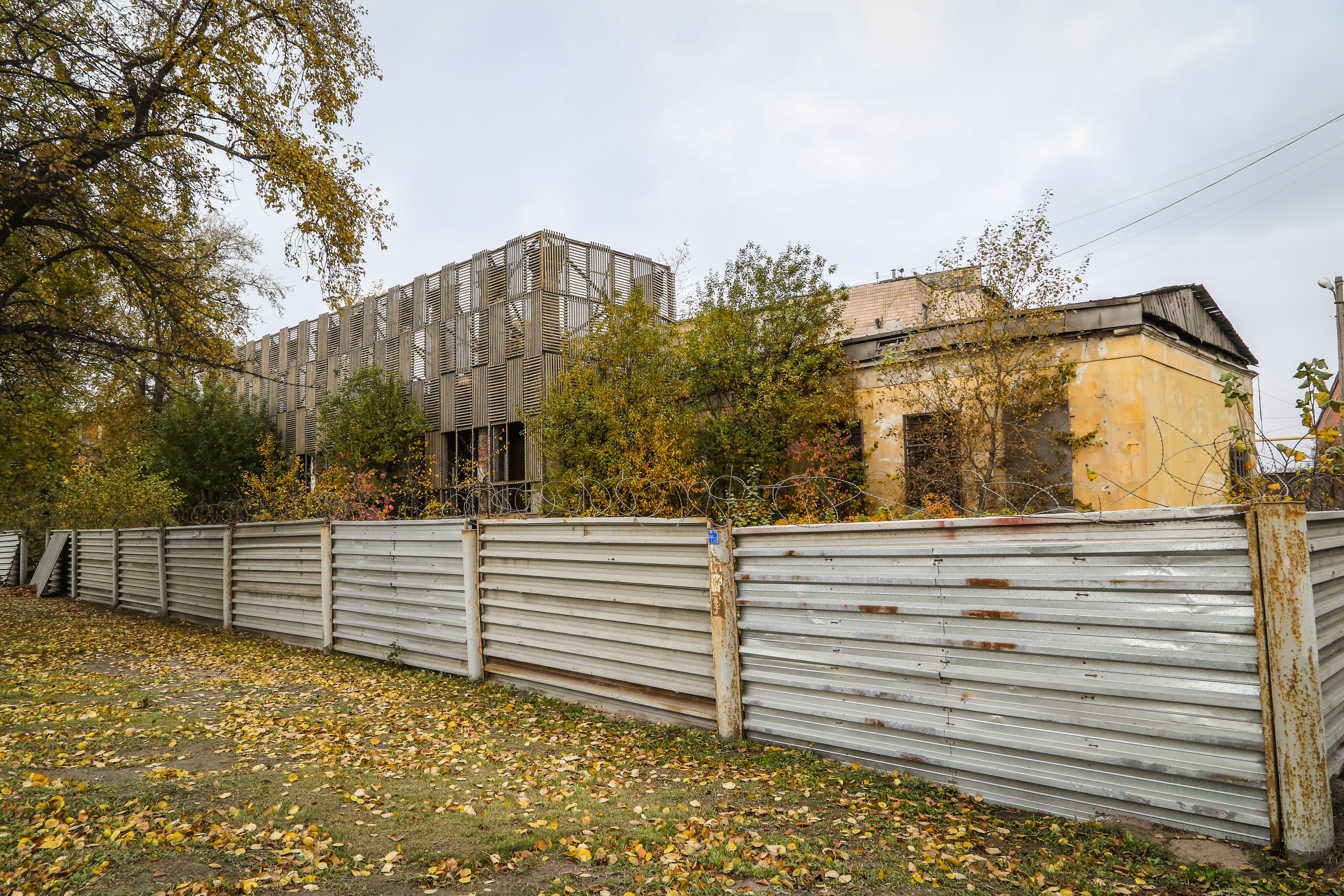 Дача Дурново (Санкт-Петербург и Лен.область, Санкт-Петербург, Свердловская наб., 22)